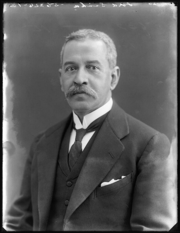 Lord Sina